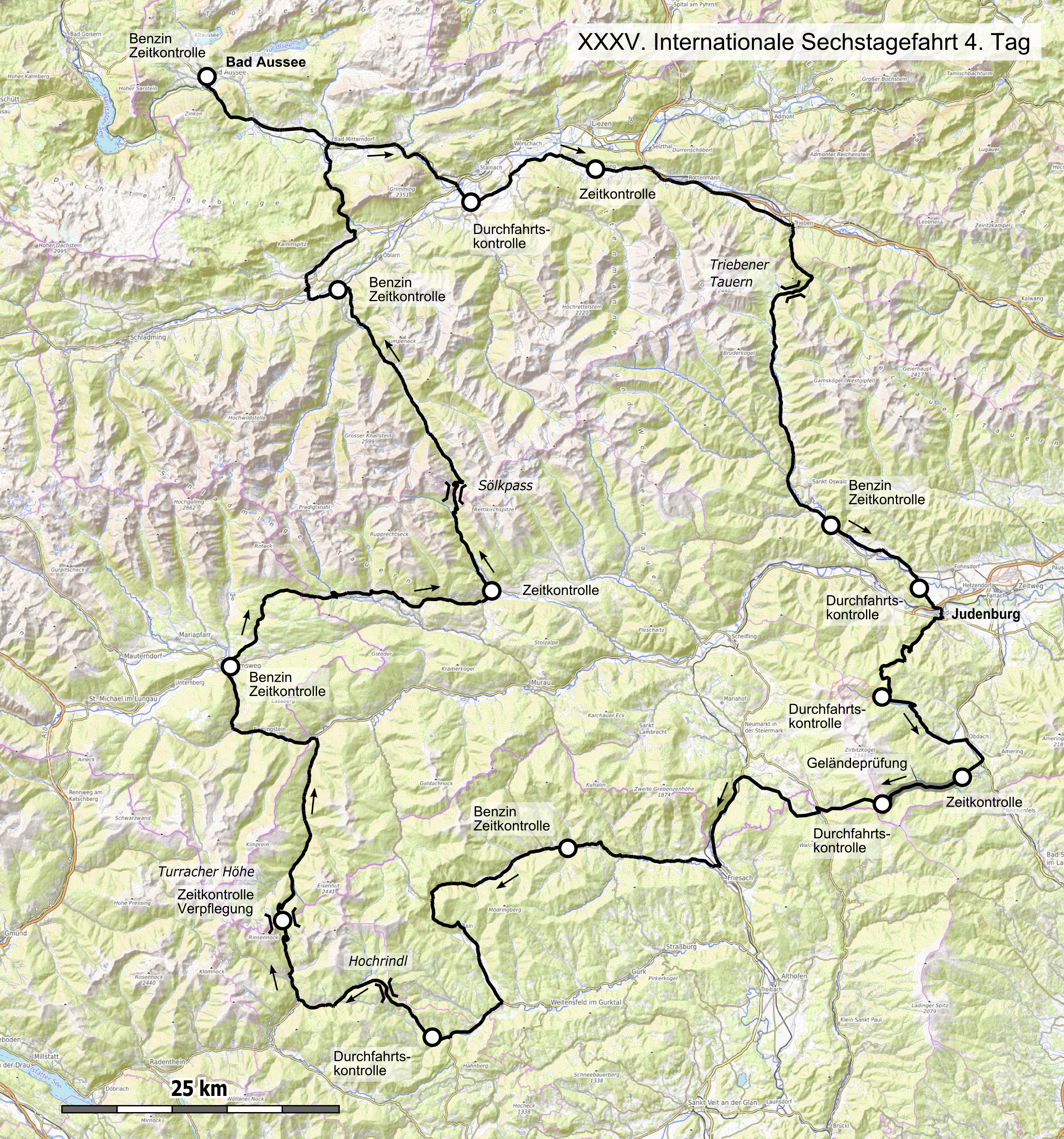 Karte der 35. Internationale Sechstagefahrt, Route des 4. Tages